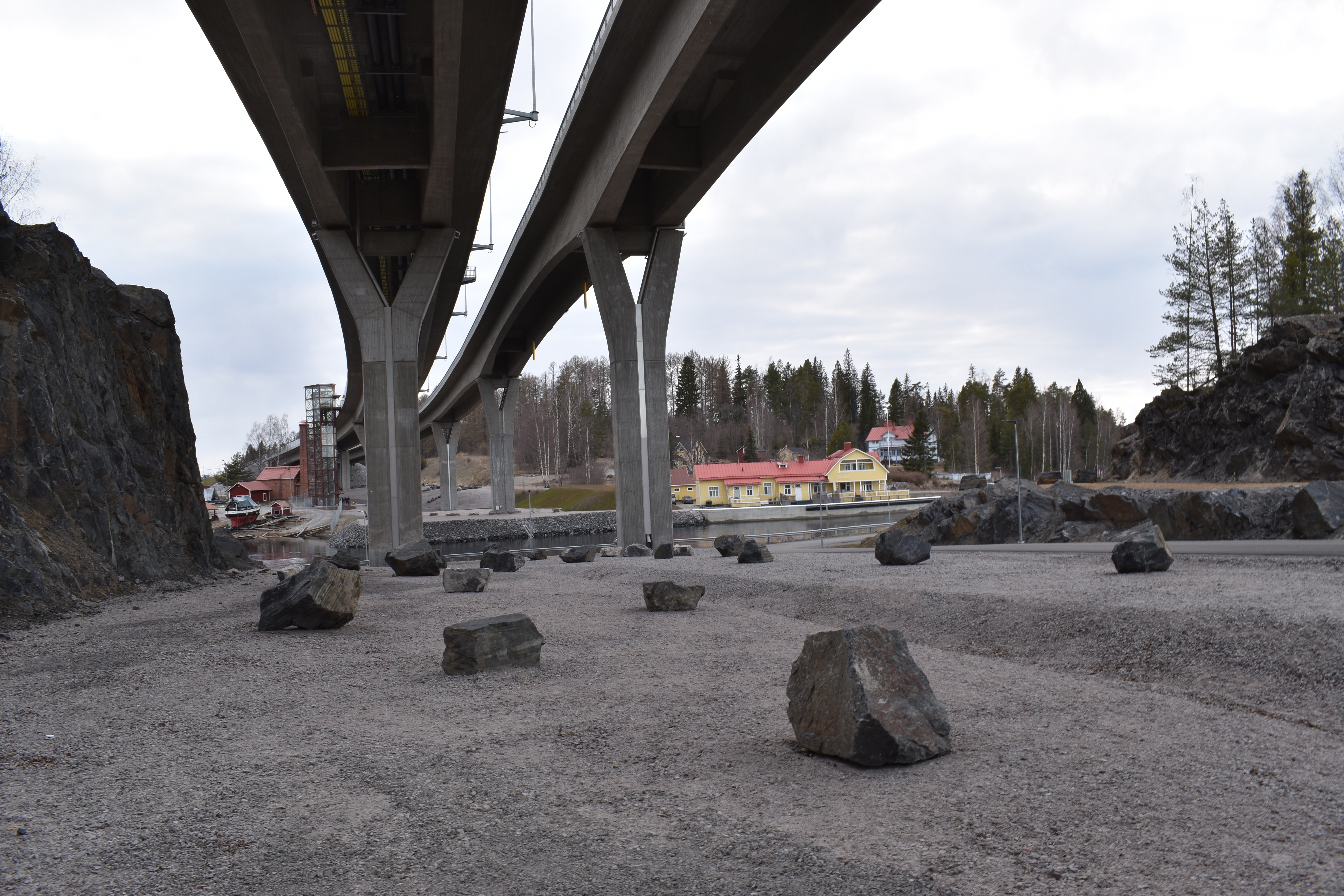 Laitaatsalmen sillat